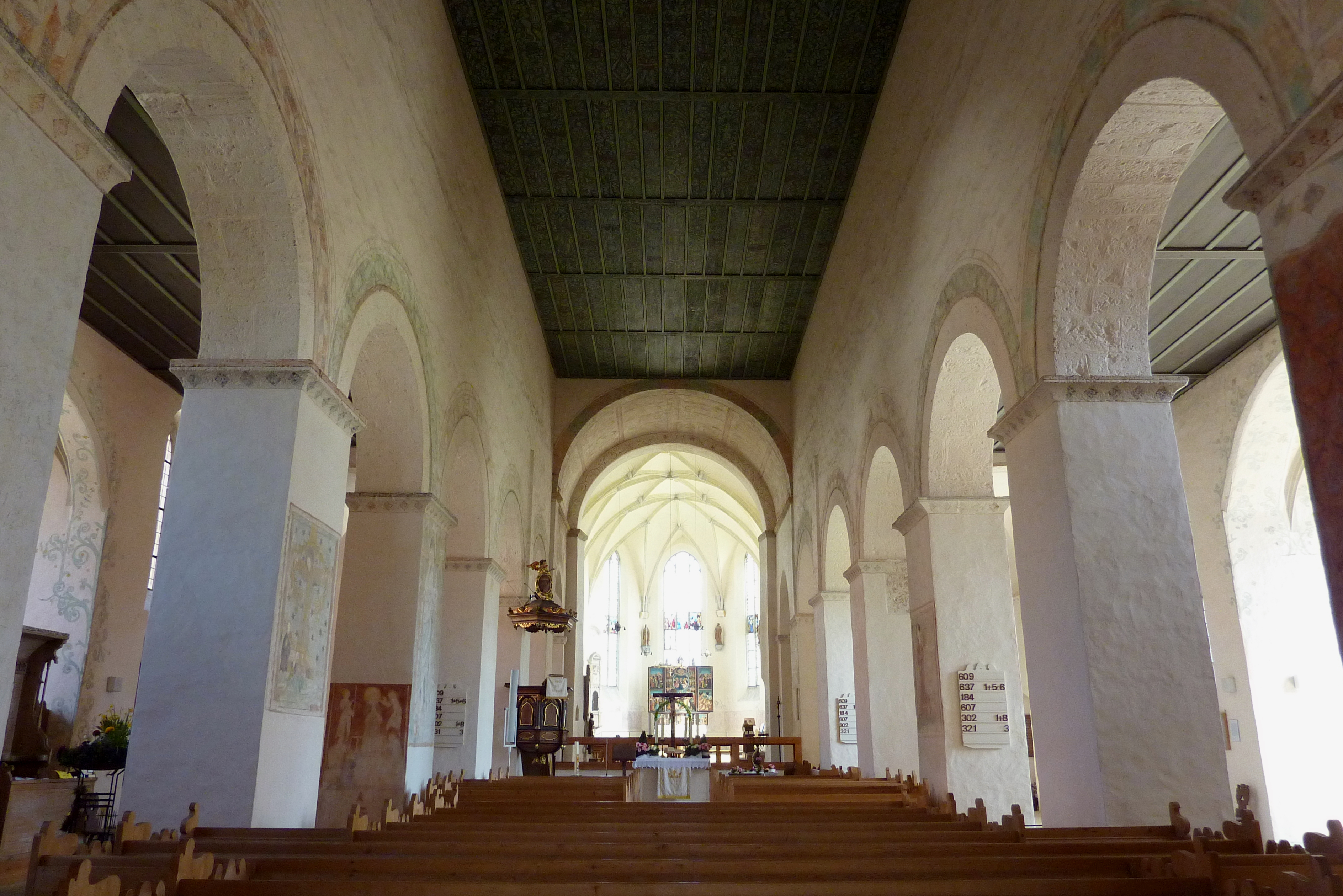 Evangelische Pfarrkirche, ehemalige Benediktinerklosterkirche St. Maria in Auhausen im Landkreis Donau-Ries (Bayern), Innenraum mit Blick zum Chor